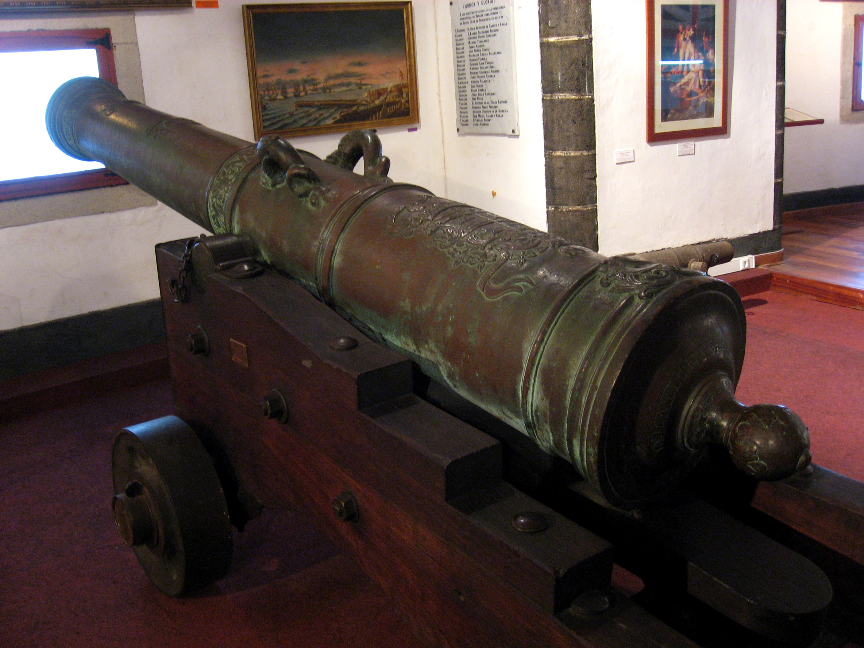 Cañón Tigre, Museo Militar de Almeyda, Santa Cruz de Tenerife. Hoy en el Centro de Interpretación „Castillo de San Cristóbal“ debajo de la Plaza de España